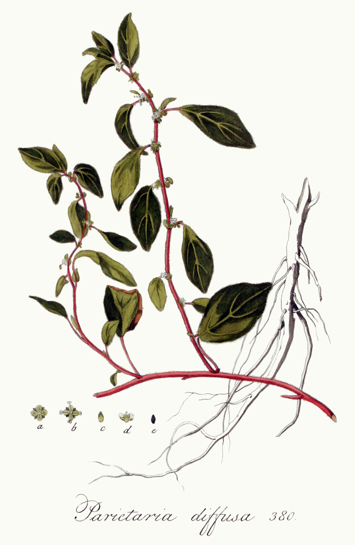 Parietaria judaica L. (Syn. Parietaria diffusa Mert. & Koch)